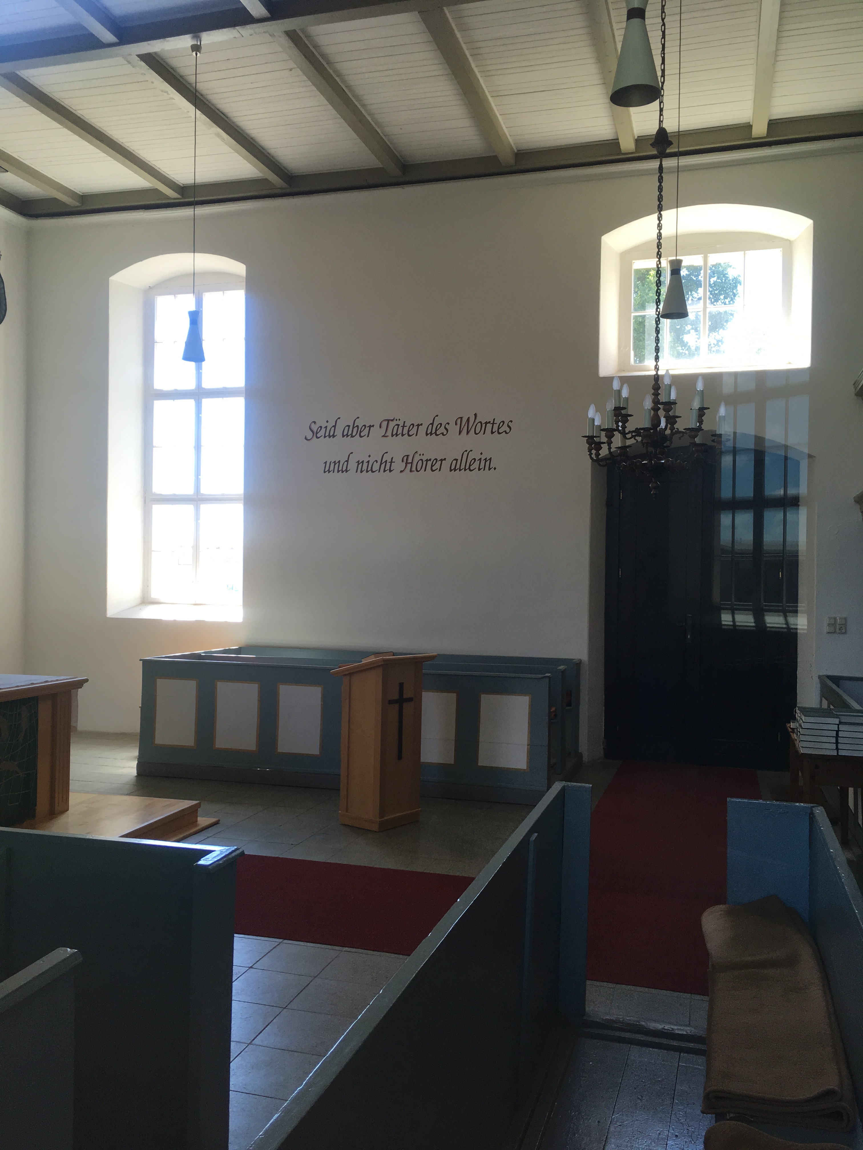 Die Dorfkirche in Schünow, Stadt Zossen in Brandenburg, ist eine Saalkirche aus dem Jahr 1765 bis 1767. Im Innern ist ein Kanzelaltar aus der Bauzeit.